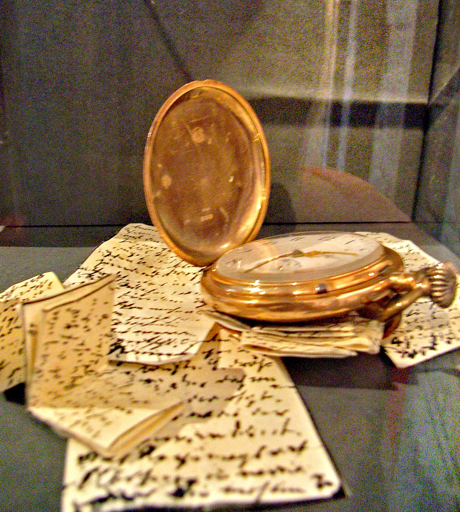 Taschenuhr Fritz Solmitz und Nachbildung von Notizen auf Zigarettenpapier